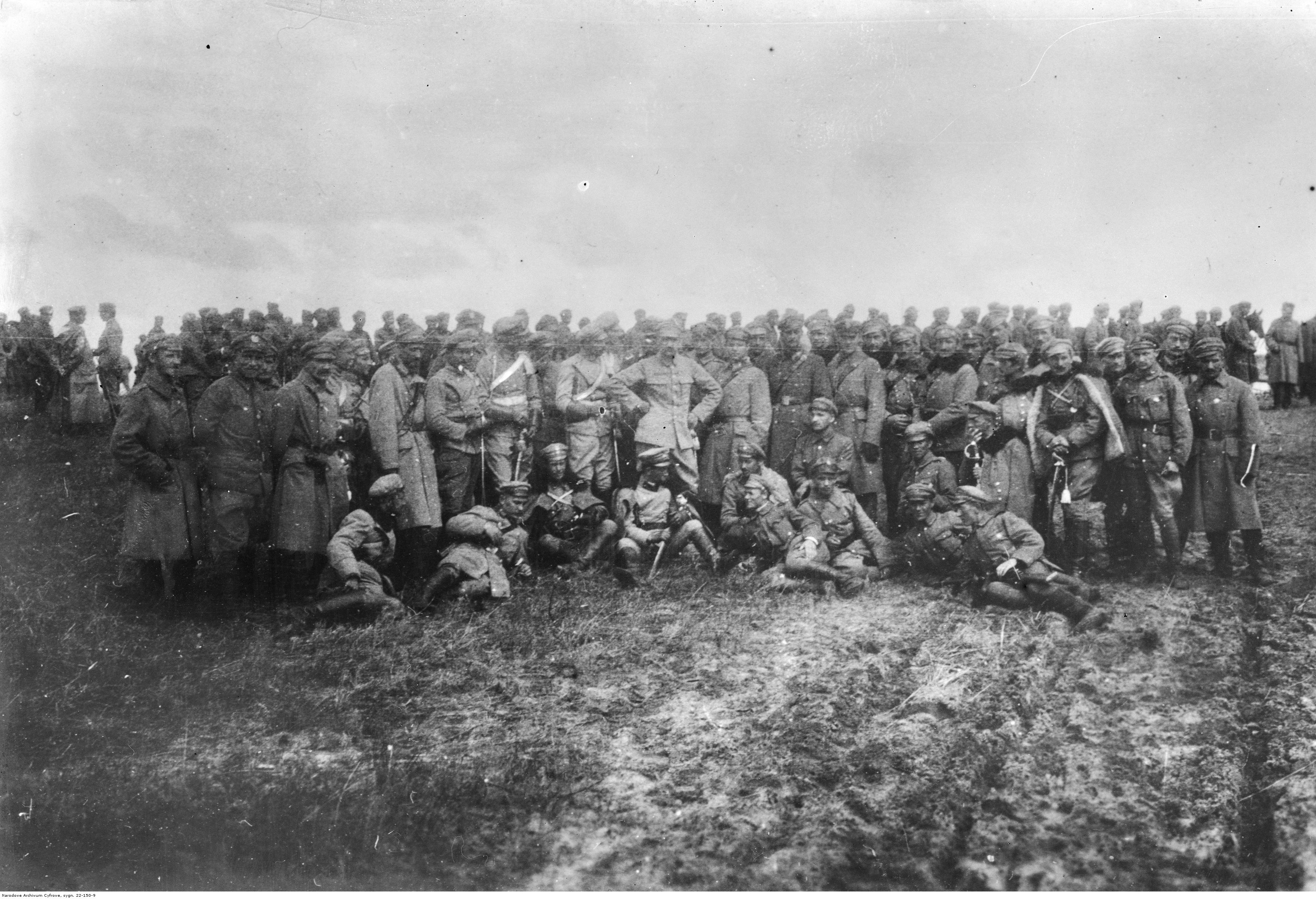 Fotografia grupowa odznaczonych z komendantem Józefem Piłsudskim (stoi w środku) zrobiona po dekoracji. W pierwszym rzędzie widoczni m.in.: Jerzy Eustachy Gliński (1. z lewej), Zygmunt Młot-Przepałkowski (3. z lewej), Wielowski (4. z lewej), Zygmunt Antoni Józef Platonoff ps. "Plater" (5. z lewej), Konrad Zembrzuski "Bury" (7. z lewej, klęczy). Stoją m.in.: Stefan Hanka-Kulesza, Bohdan Dan-Stachlewski, Kazimierz Peszkowski, Ludwik Kmicic-Skrzyński, Antoni Jabłoński ps. "Zdzisław", Janusz Głuchowski, Władysław Belina-Prażmowski.